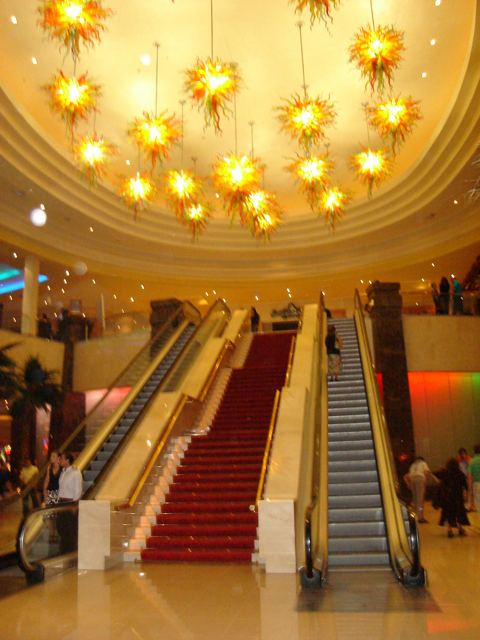 Ingreso al casino Monticello, Chile.